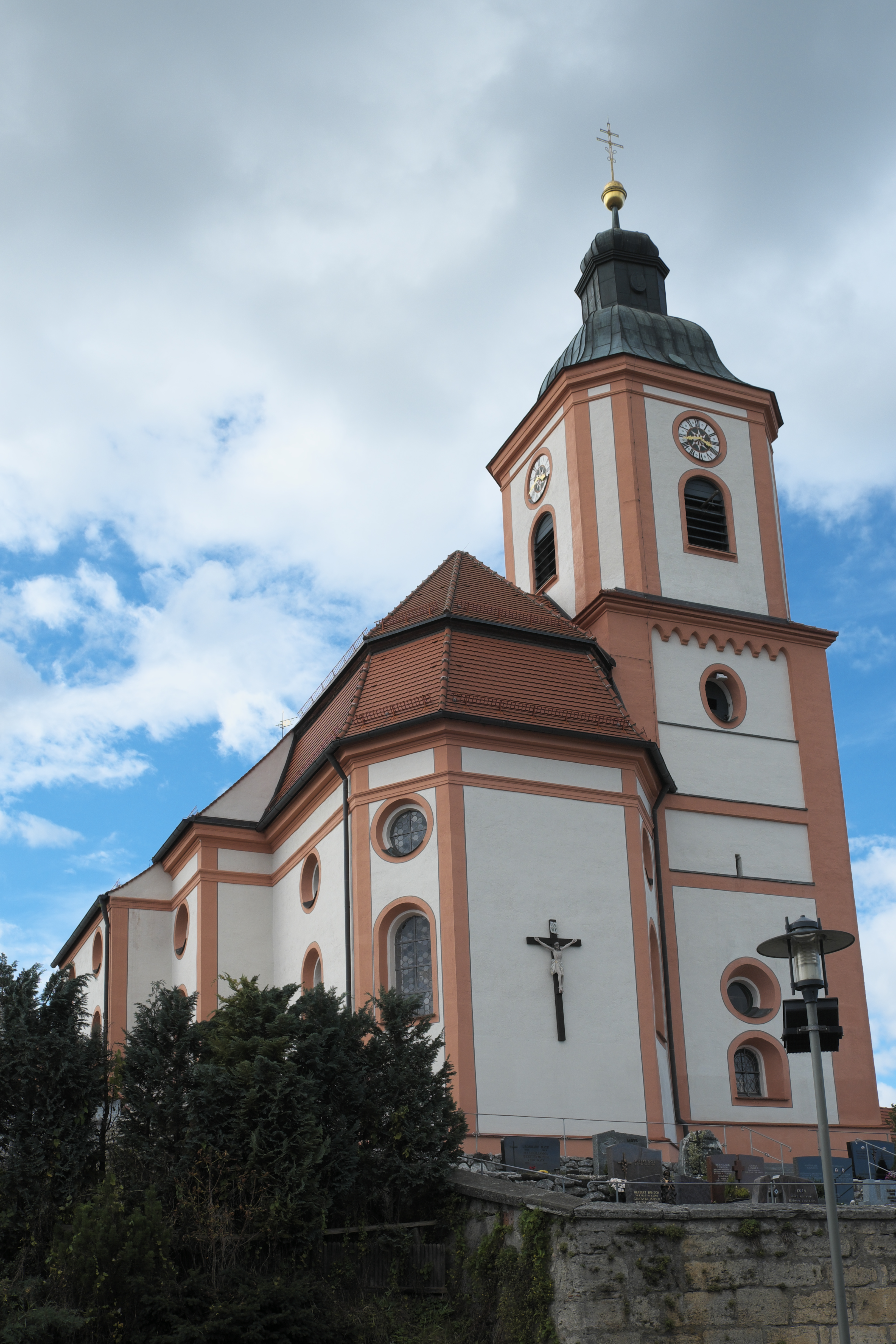 Katholische Pfarrkirche St. Nikolaus in Reichling im Landkreis Landsberg am Lech (Bayern/Deutschland)